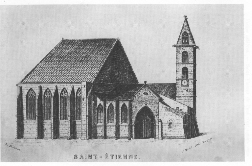 vue de l'Église st-Étienne de st-Mihiel entre le XVIe siècle et 1824.